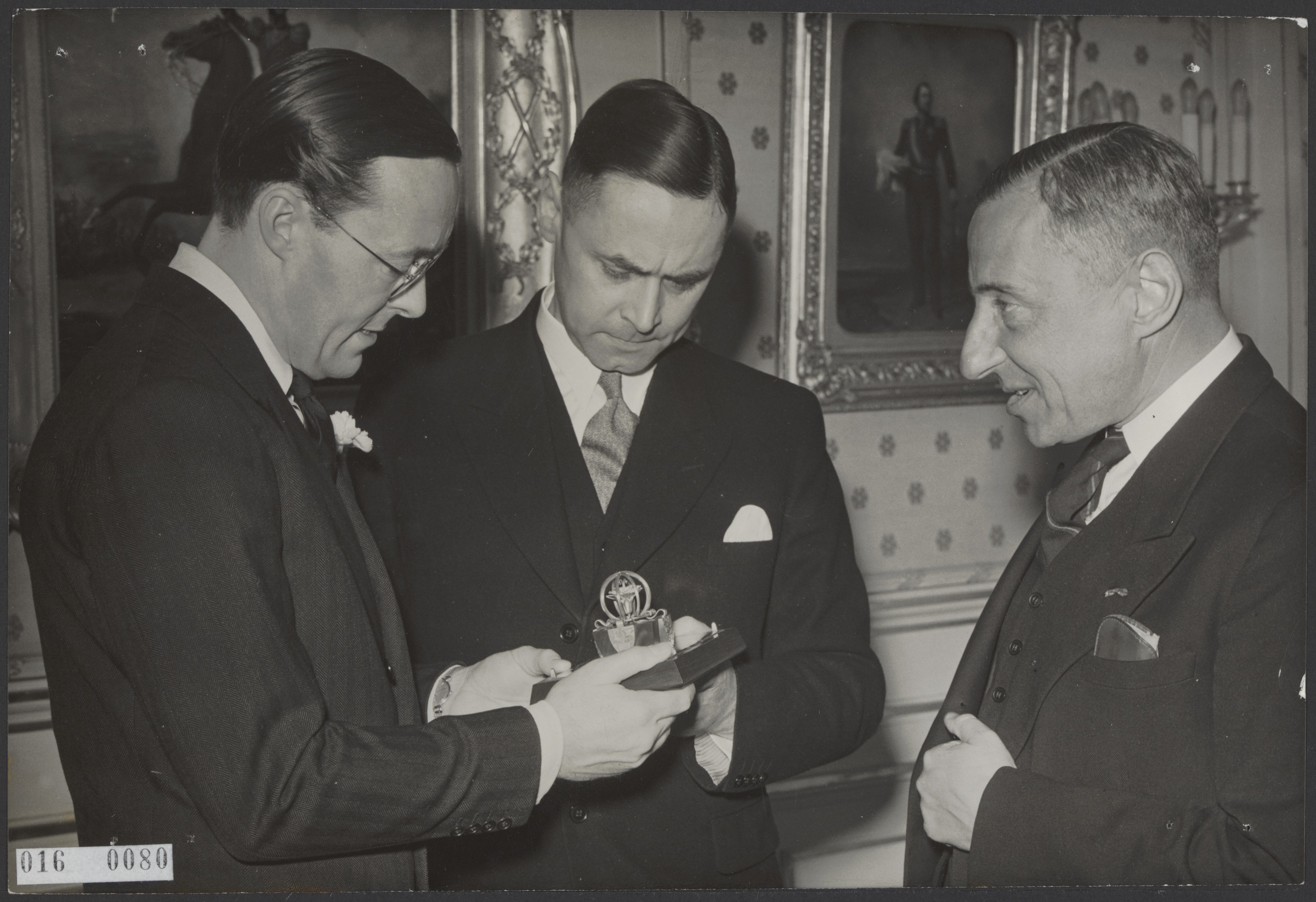 Collectie / Archief : Fotocollectie Elsevier Reportage / Serie : [ onbekend ] Beschrijving